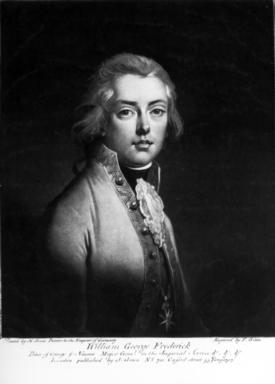 Wilhelm Georg Friedrich von Oranien-Nassau (1744-1799), Prinz